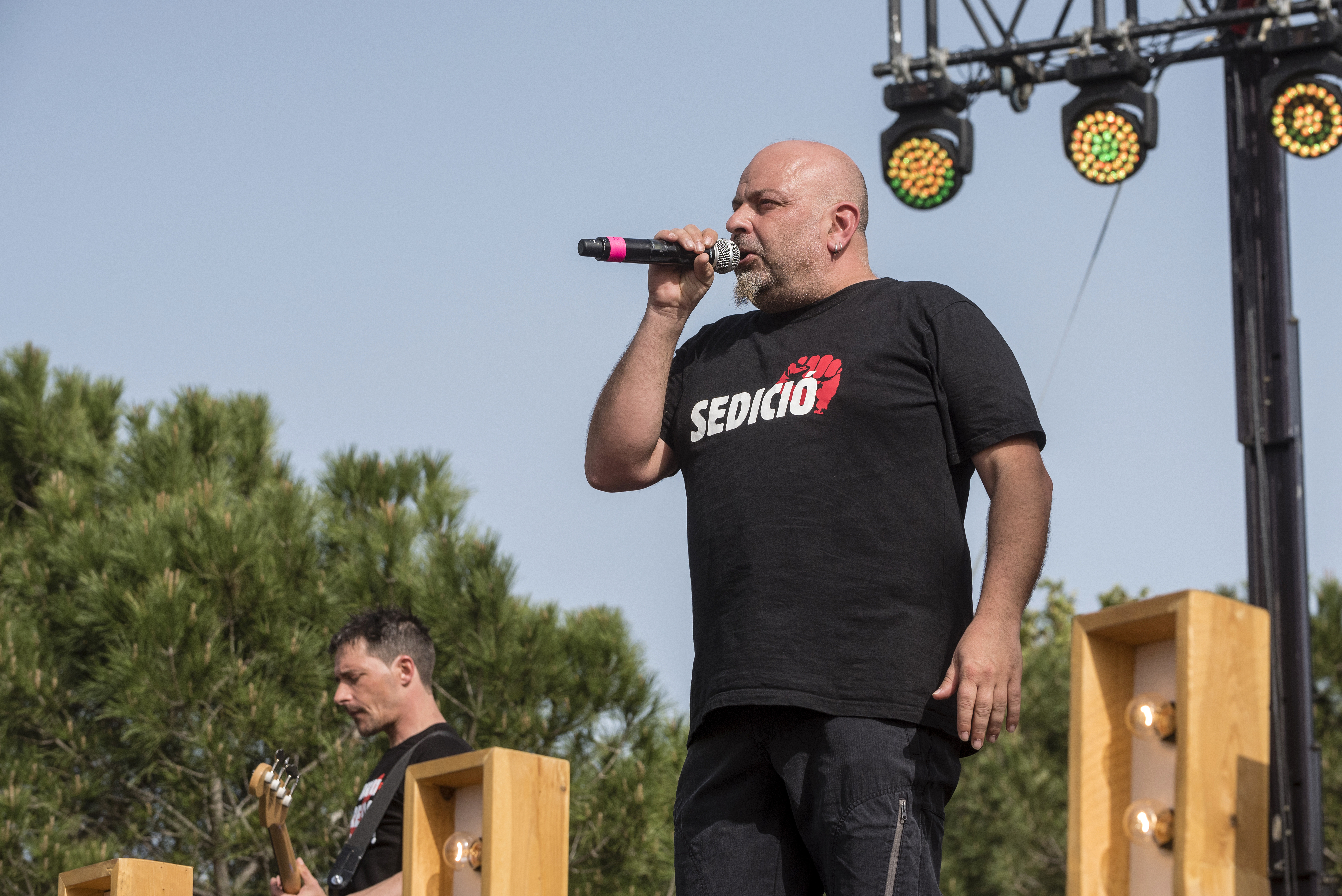 _DC73658